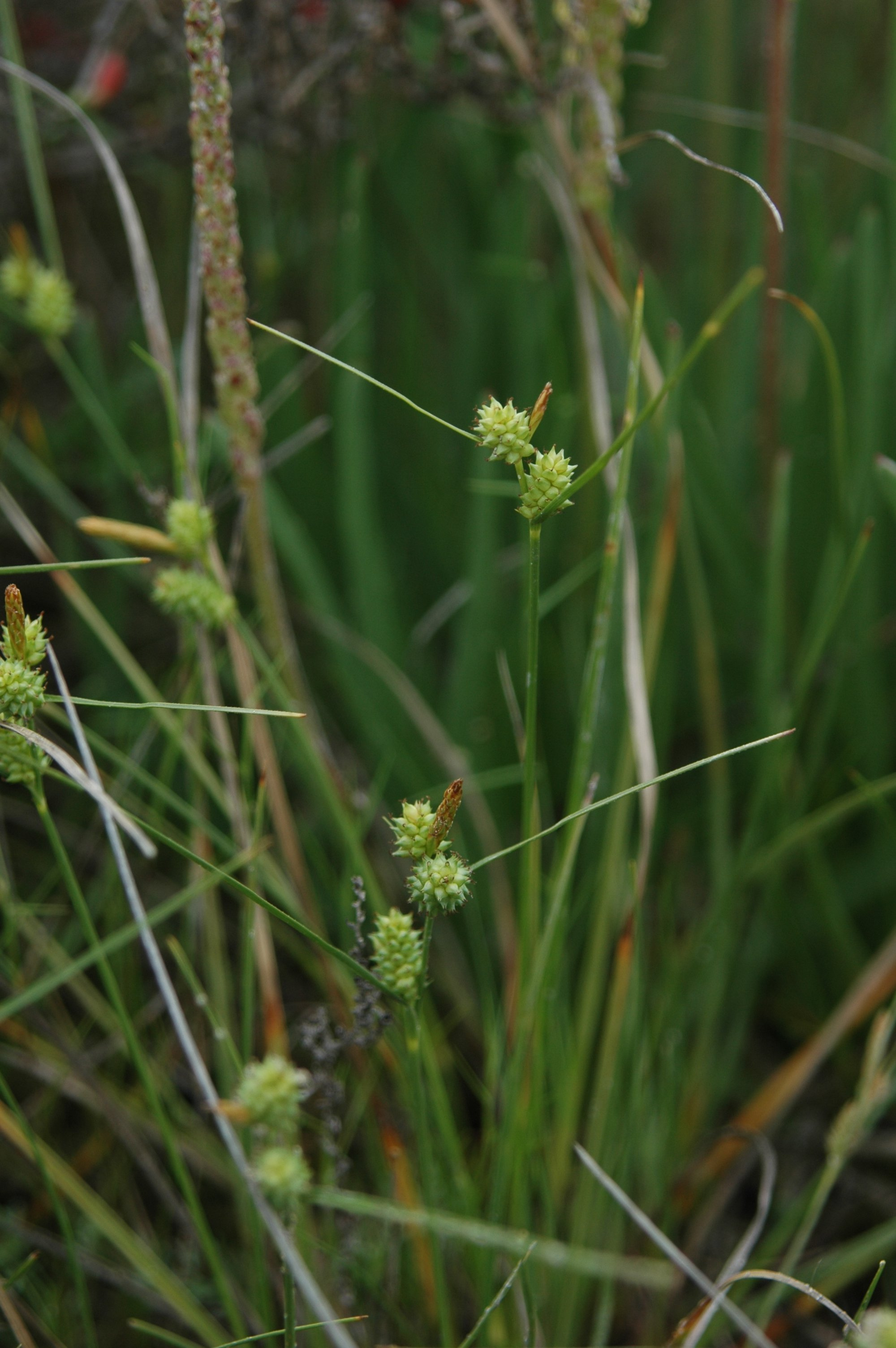 Carex extensa